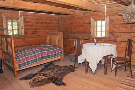 Другі паверх свіронка ў музеі А.Міцкевіча ў Завоссі. Фота ўзята з сайта Дзяржаўнага музея гісторыі беларускай літаратуры.